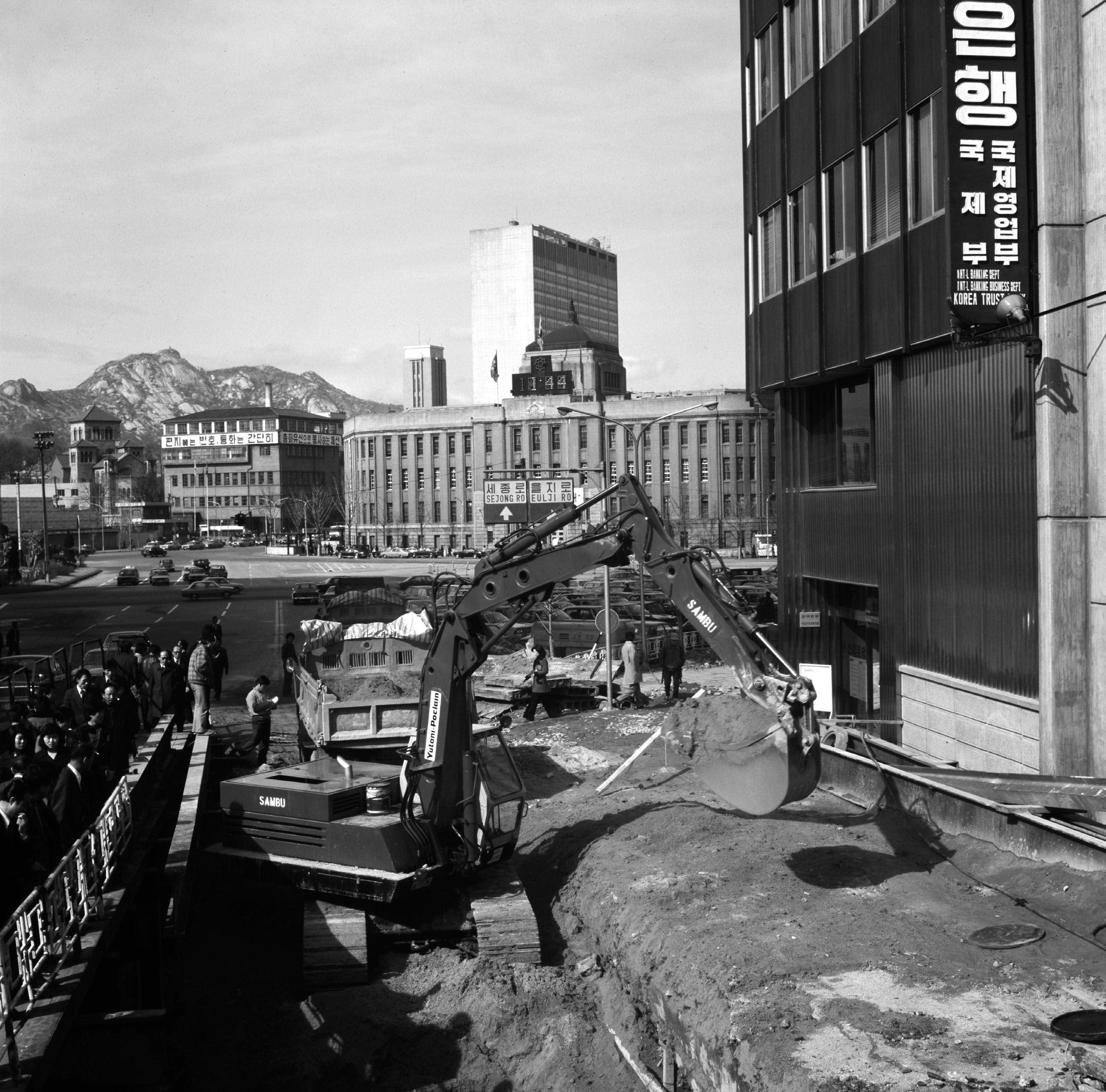 촬영일 : 1976년 02월 17일 촬영장소 : 대한민국 서울 소공동. 오른쪽 모서리에 보이는 은행은 신탁은행 국제영업부이며 현재의 하나은행 소공동지점(소공로 116)이다. 참석자 : 없음 관련내용 : 서울 소공동의 소공지하쇼핑센터 건축 공사 현장